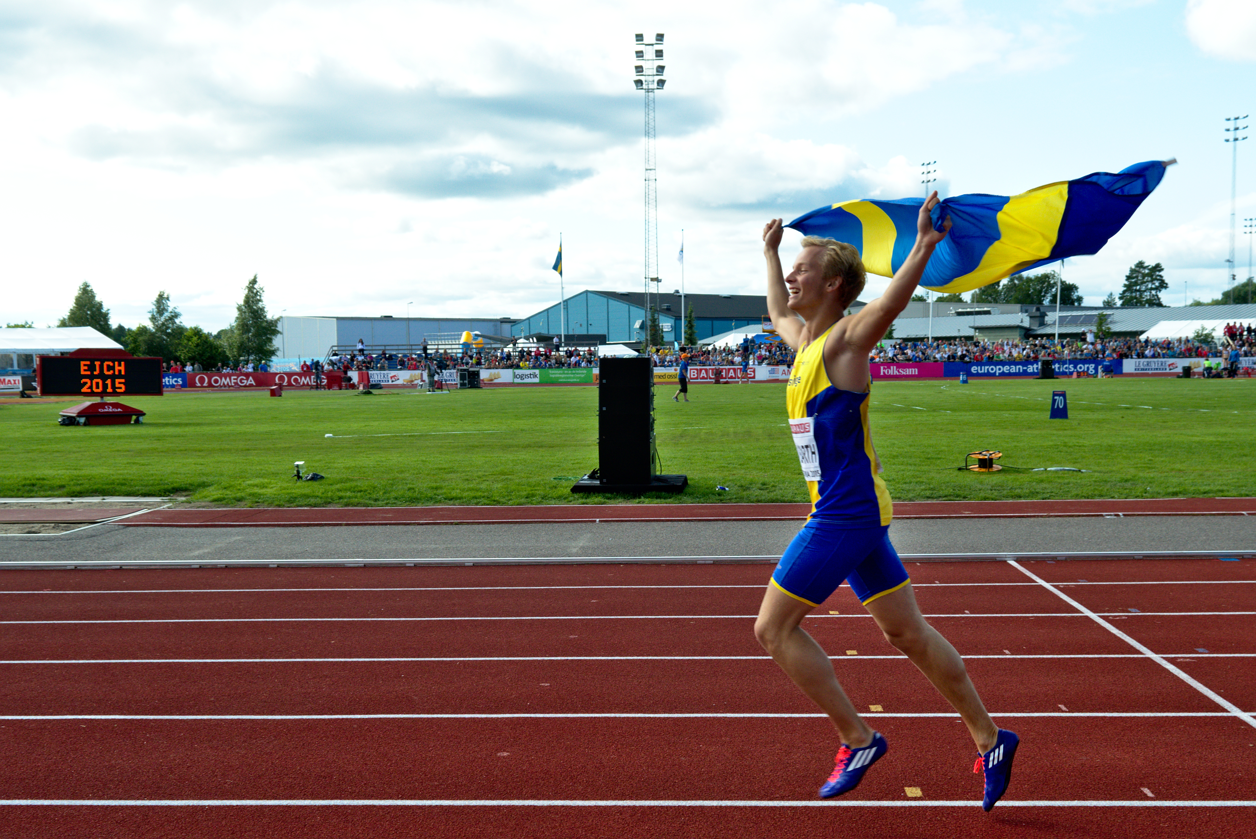 Emil von Barth firar sin bronsmedalj på JEM 2015.